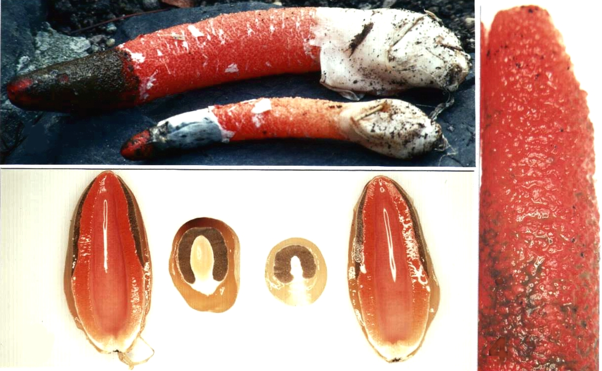 Champignon gastéromycète (récoltes japonaises) Nom scientifique : Mutinus elegans (Montagne) Ed. Fischer (1888), in Saccardo, Sylloge Fungorum 7 (1) :13 Nom français : Satyre élégant Nom japonais : Tanuki-no-beni-efude (タヌキノベニエフデ, 狸紅絵筆)